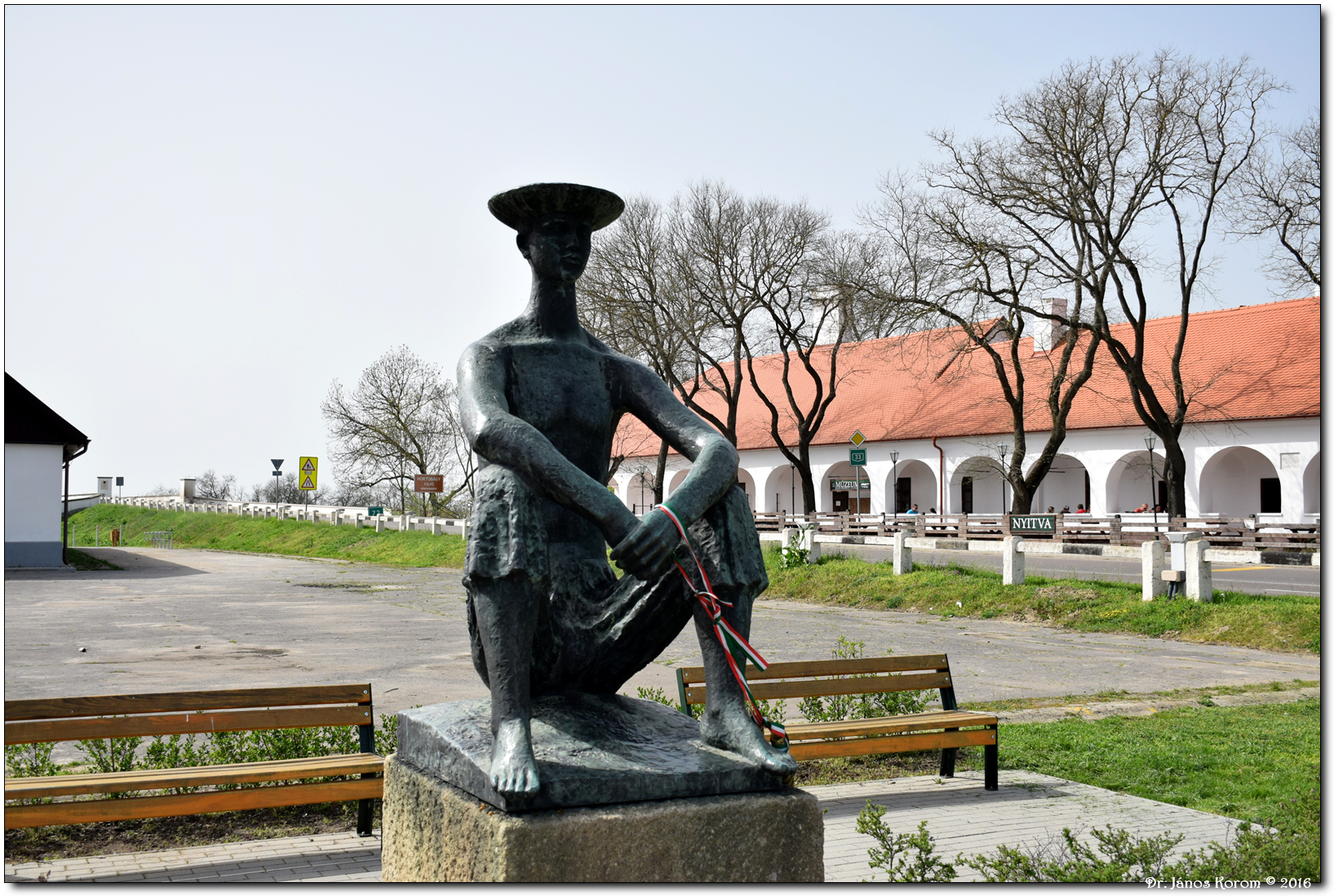 Pásztorfiú szobra 1968-ban avatták fel a Pásztormúzeum előtt Somogyi Árpád szobrászművész alkotását. A bronzszobor pásztorkalapban, bő gatyában, ülve ábrázolja a rideg körülményekhez szokott pusztai embert.